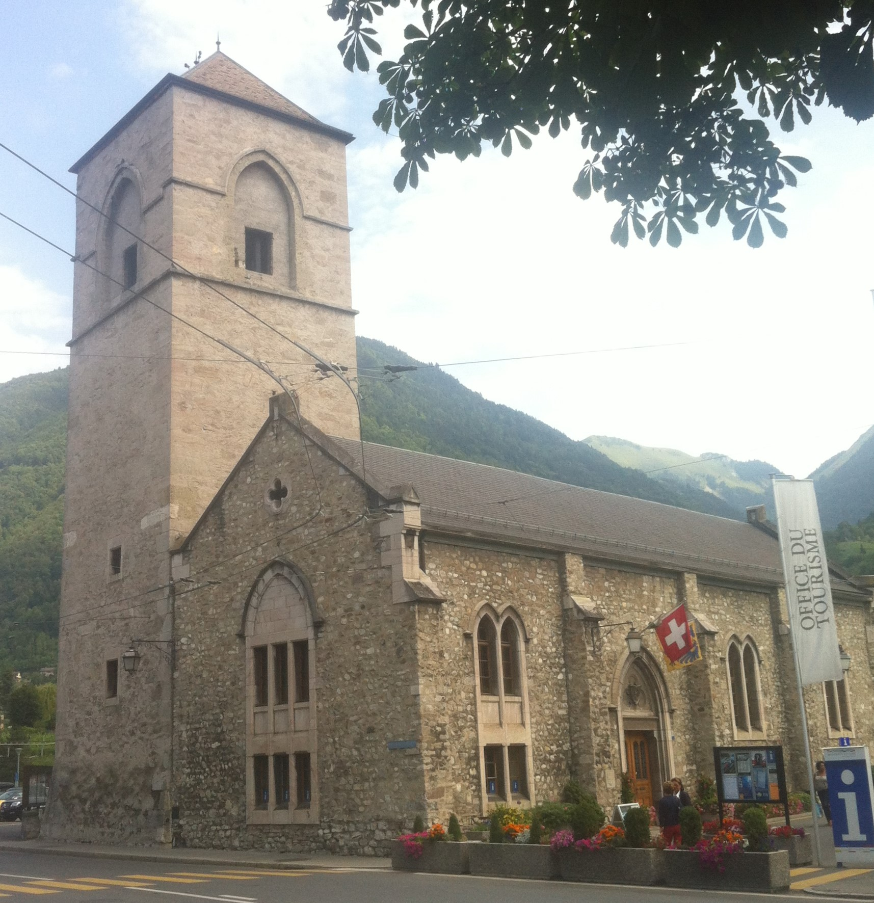 Ancienne chapelle de l'hôpital Notre-Dame transformée en Hôtel de Ville, Villeneuve, Vaud